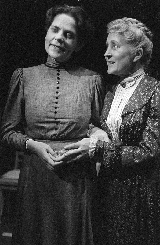 Original image description from the Deutsche FotothekSzenenbilder